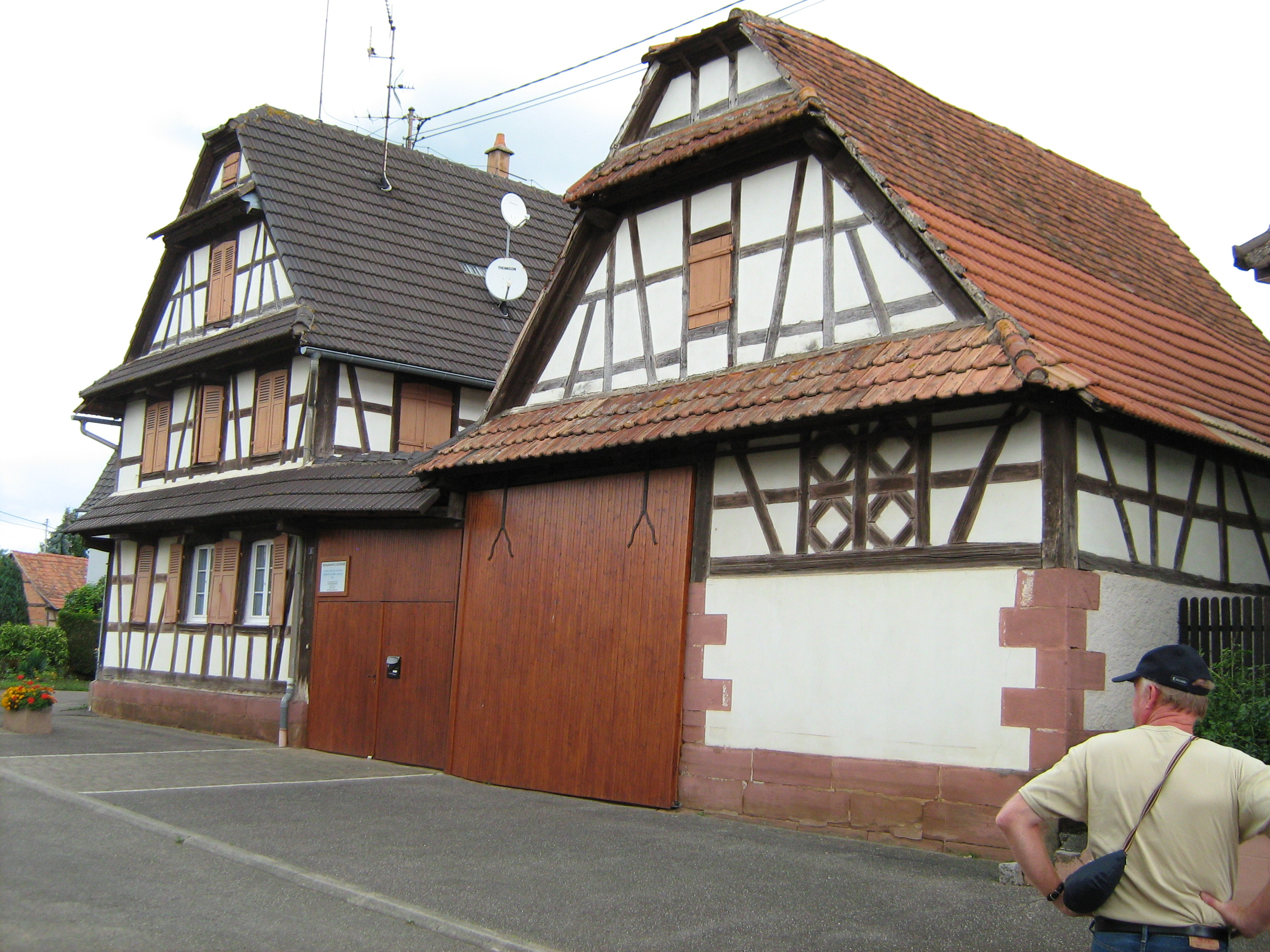 ferme à colombage à Alteckendorf